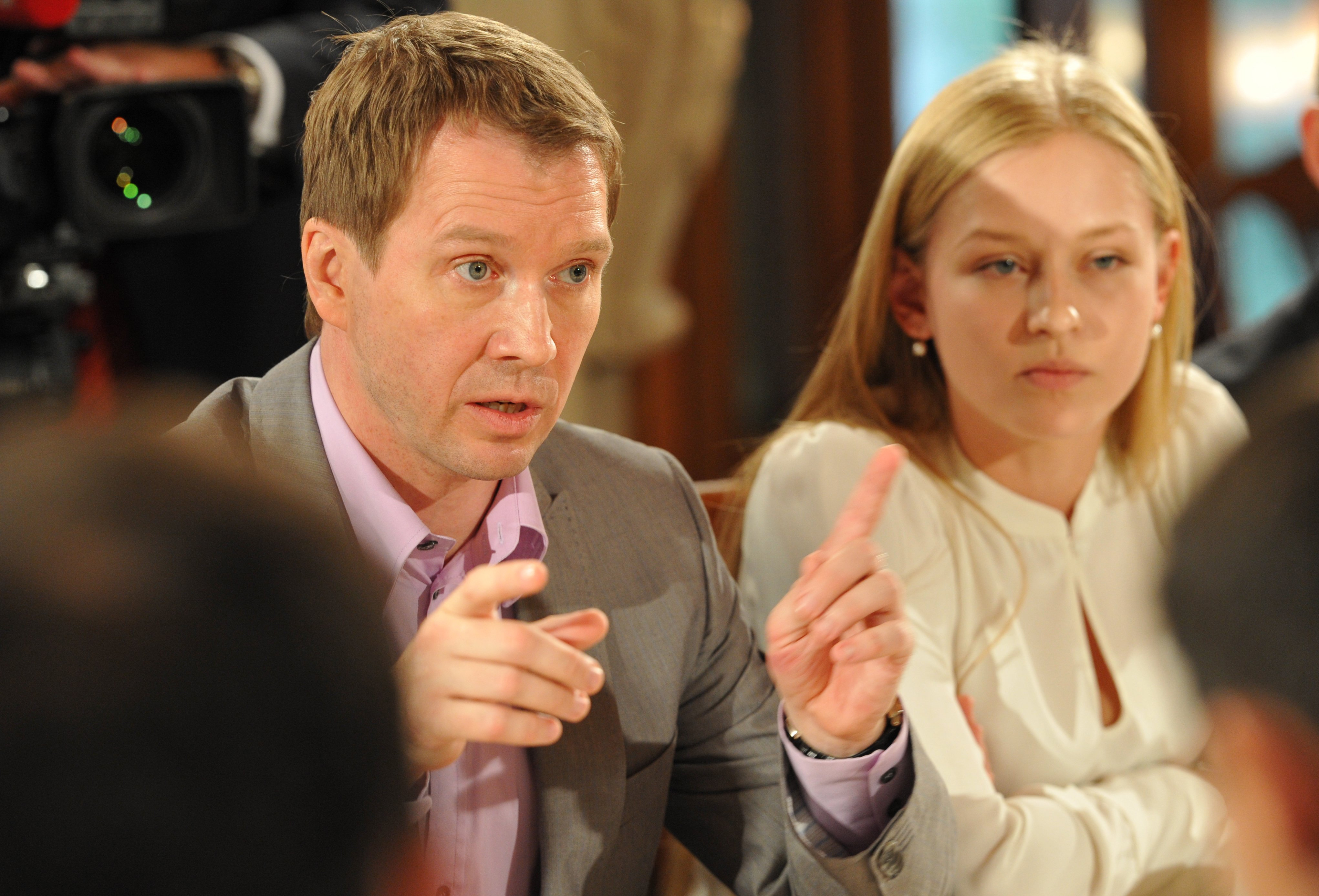 Российские актёры Евгений Миронов и Юлия Пересильд на встрече с Председателем Правительства РФ Владимиром Путиным в Государственном театре наций